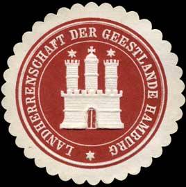 Sealing stamp Title: Landherrenschaft der Geestlande Hamburg Description: rotbraun, weiß, geprägt Place: Hamburg size: 3 cm